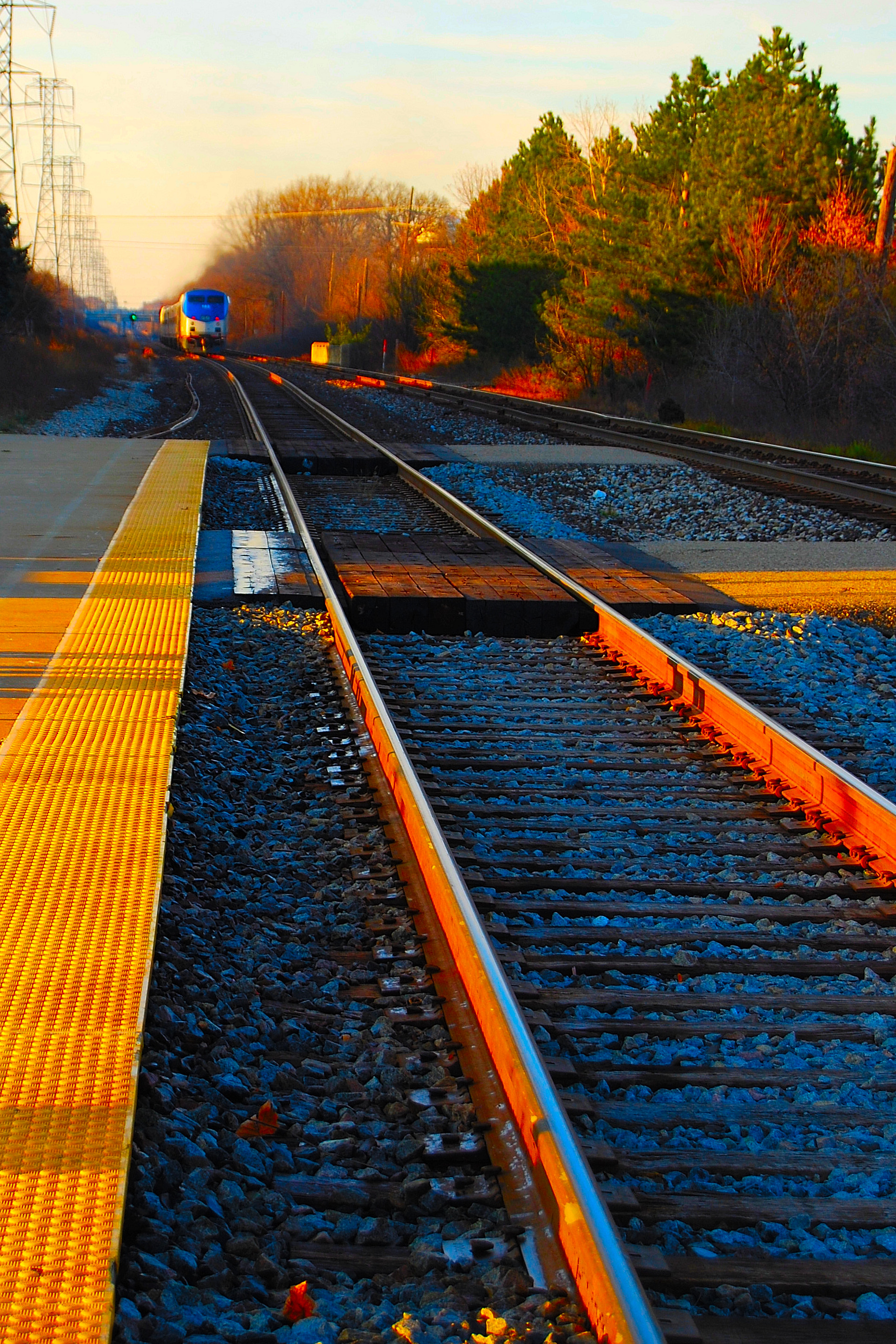 Birmingham, MI Amtrak station.